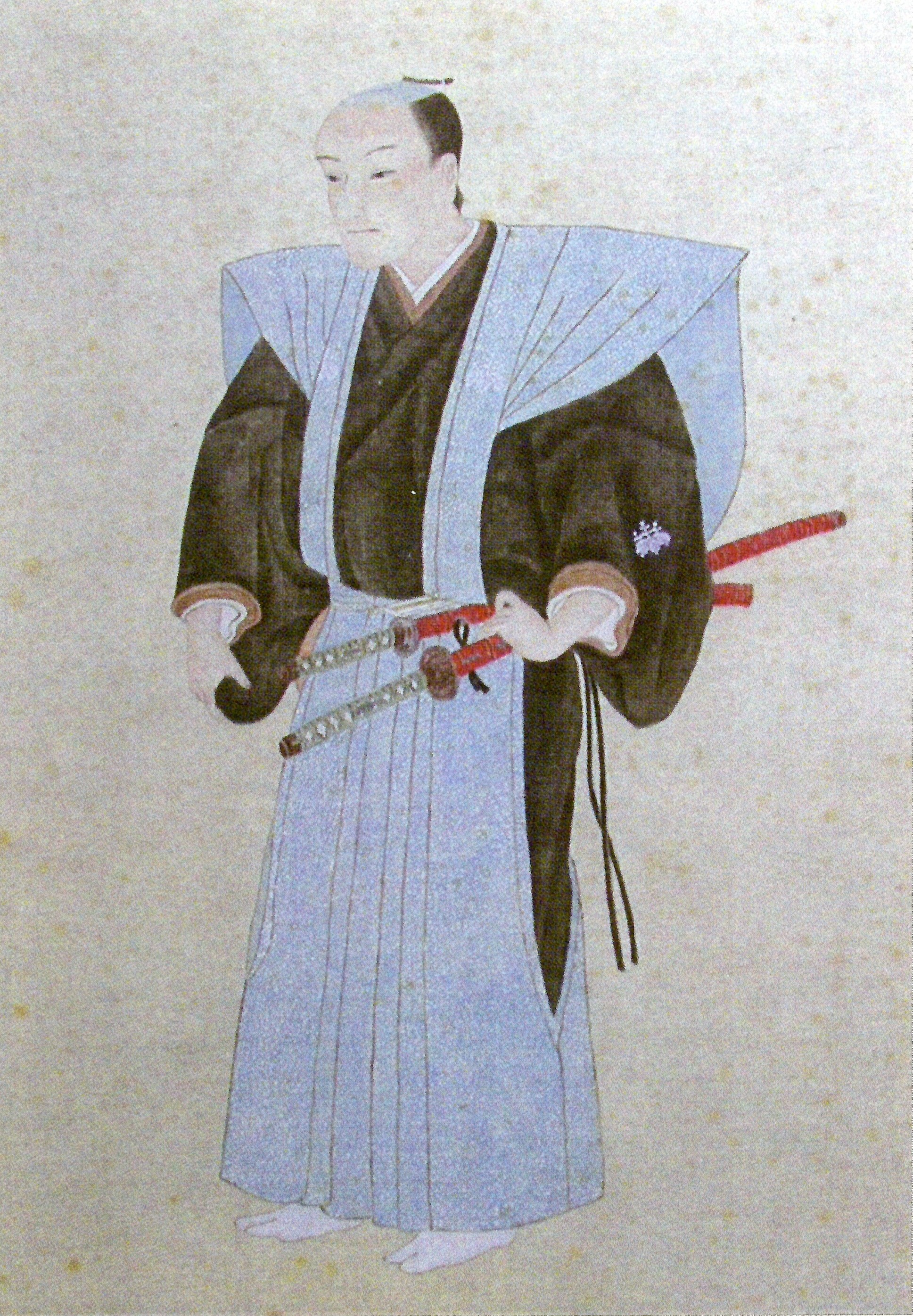 松平斉恒の肖像。